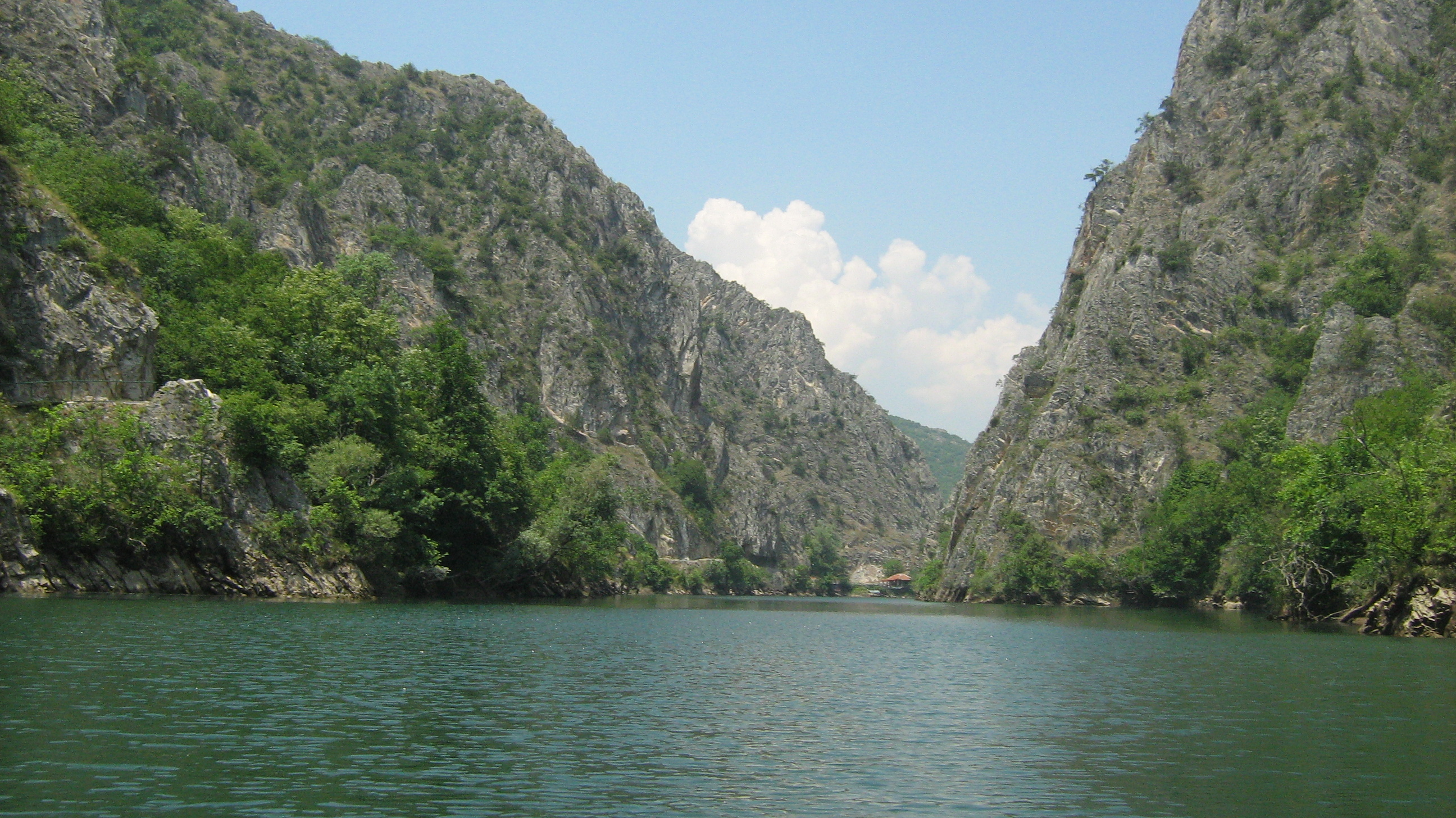 Кањонот Матка, близу браната на езерото Матка.